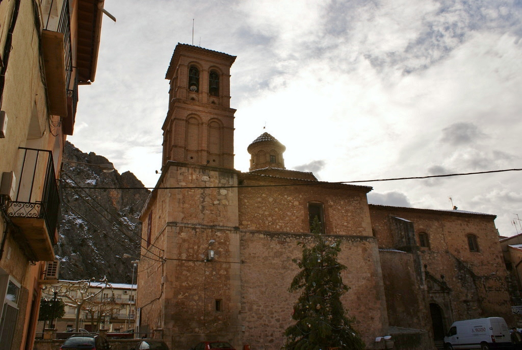 Fachada norte de la iglesia. Estilo mudéjar, barroco. S. XVII. Iglesia de la Natividad de la Santísima Virgen. Alhama de Aragón, Zaragoza. Aragón